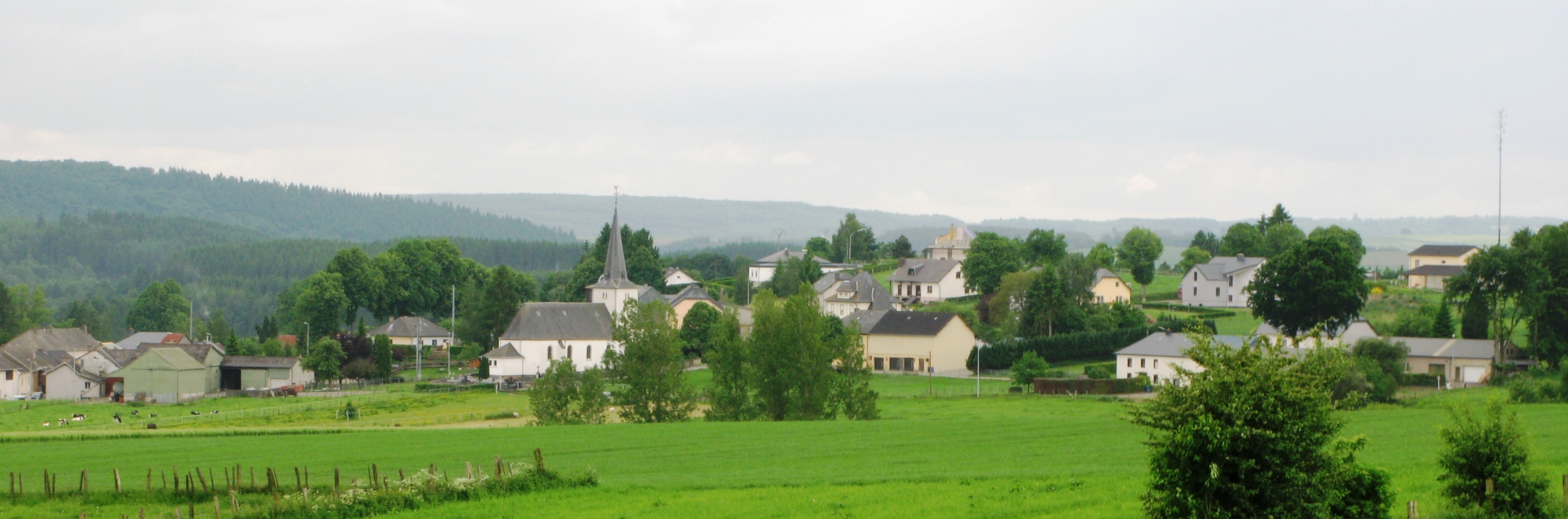 Diänjen vun der N18 aus gesinn am Mee 2008 Quell: eege Foto vum Les Meloures Kategorie:Uertschaften zu Lëtzebuerg